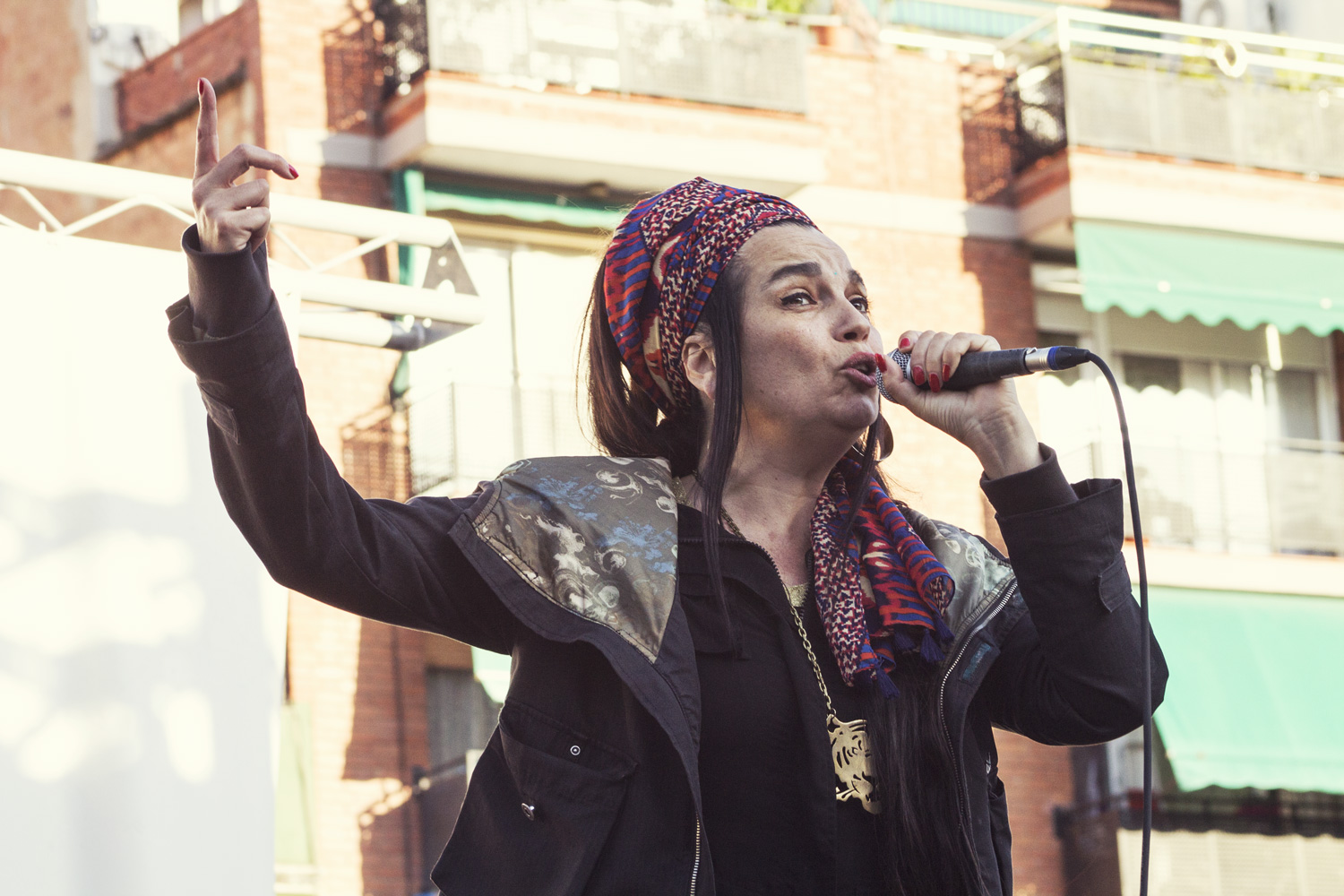 Plaça Àngel Pestanya 22/05/2015 Foto: Marc Lozano